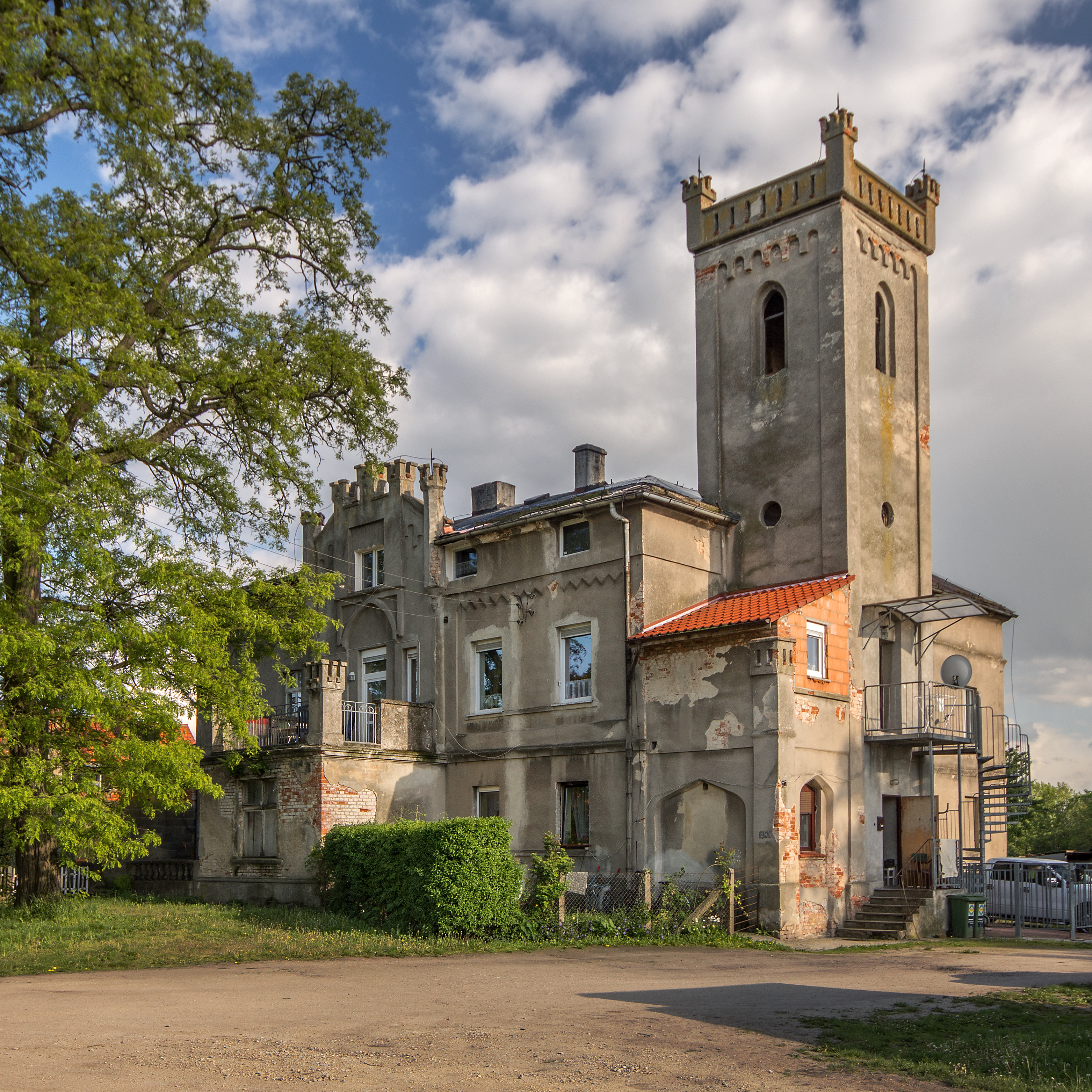 Rybnica - neogotycki pałac z poł. XIX, 1880-1890